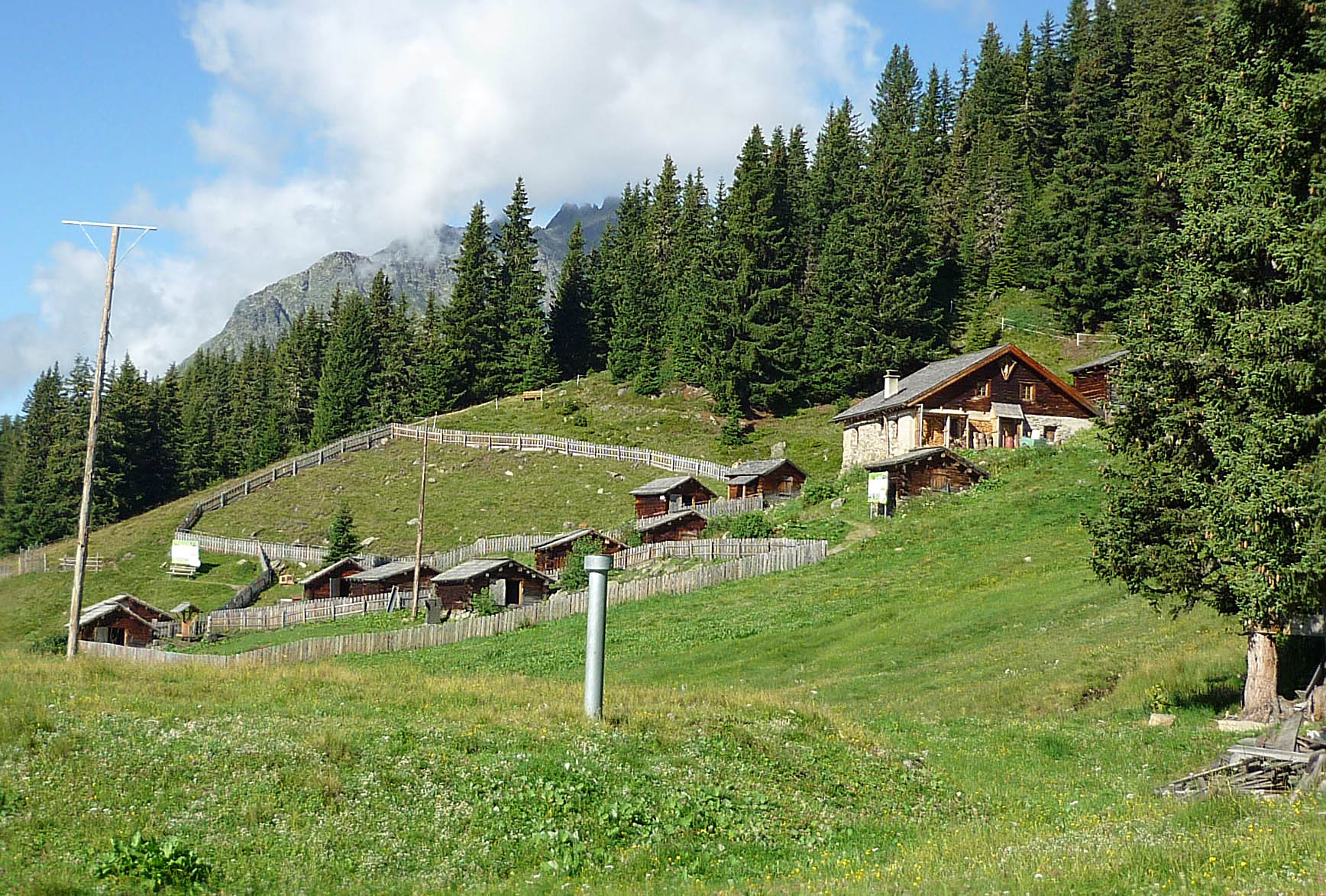 Sennhütte und Viehställe auf der alten Dias-Alpe bei Kappl